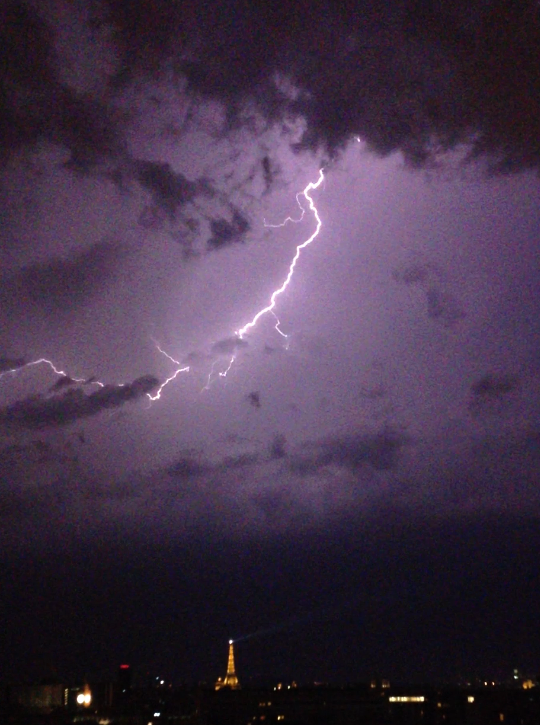 Eclair au dessus de Paris le 9 juin à 00h30